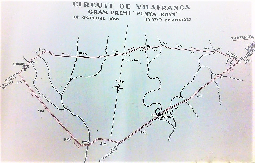 Plànol del Circuit de Vilafranca del Penedès en la cursa de 1921